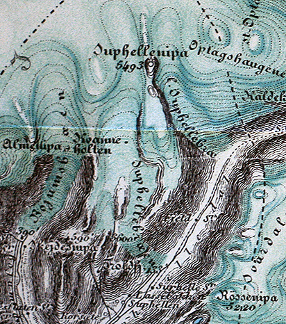 Suphellebreen på kart fra 1901.